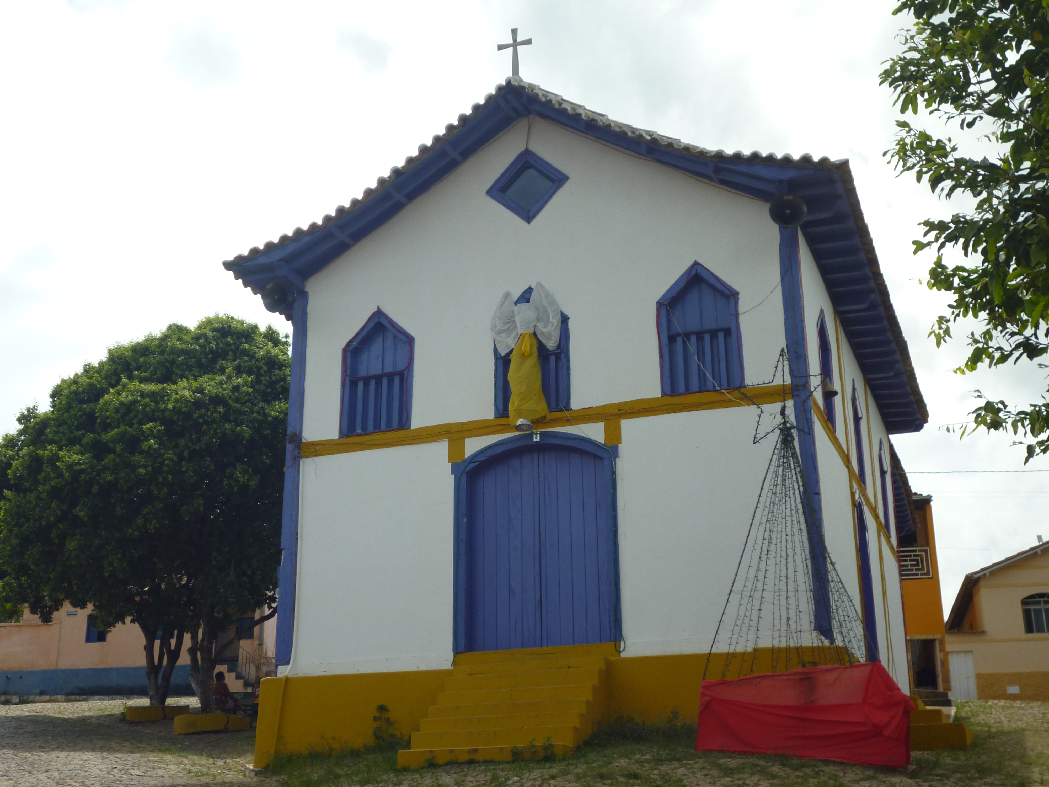 Sabinópolis MG Brasil - Igrejinha do Rosário